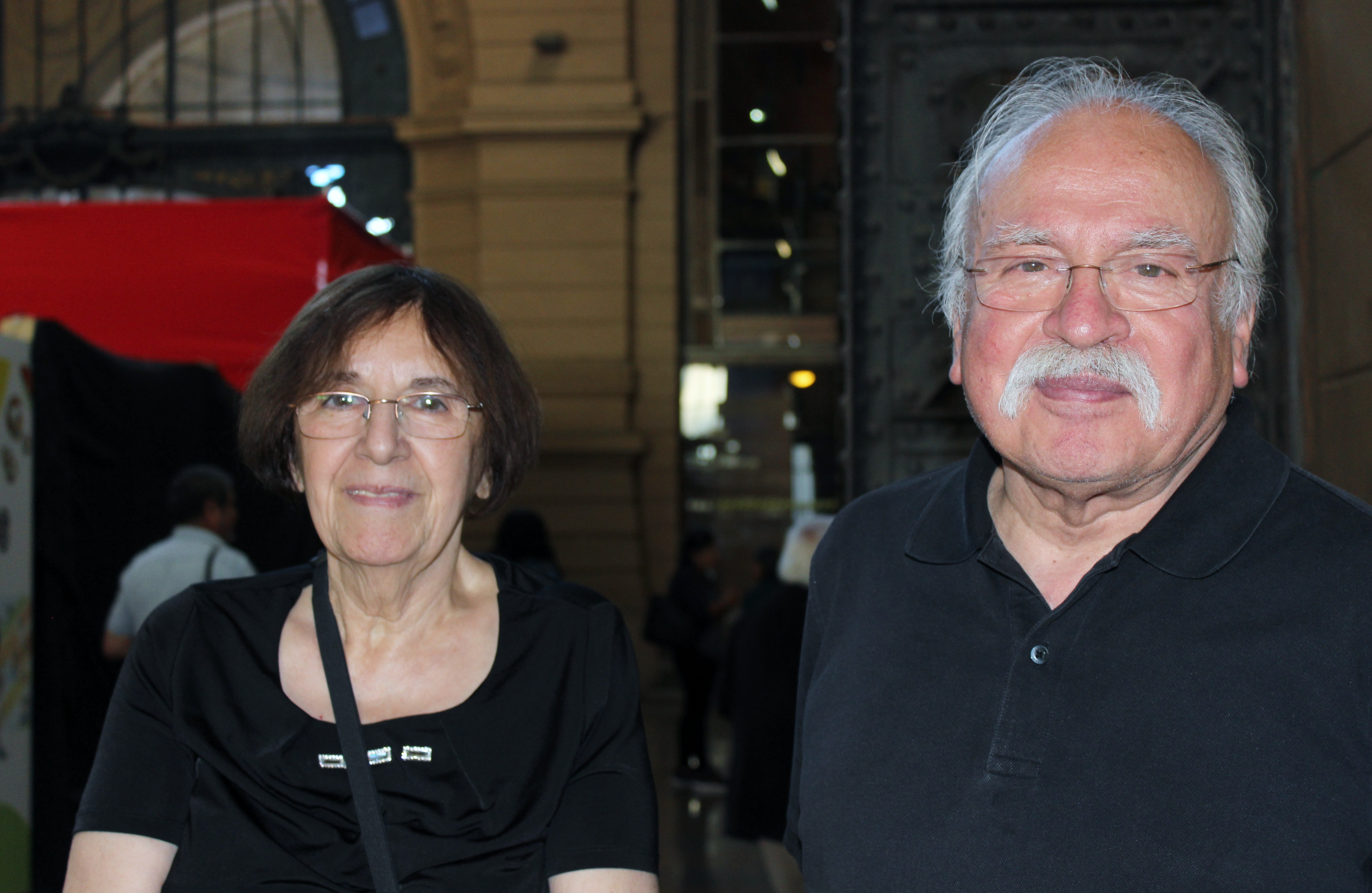 El poeta chileno Waldo Rojas junto su esposa Eli Rojas (Elisa /Eli/ Godoy, hija del escritor Juan Godoy) en la Feria Internacional del Libro de Santiago 2018.